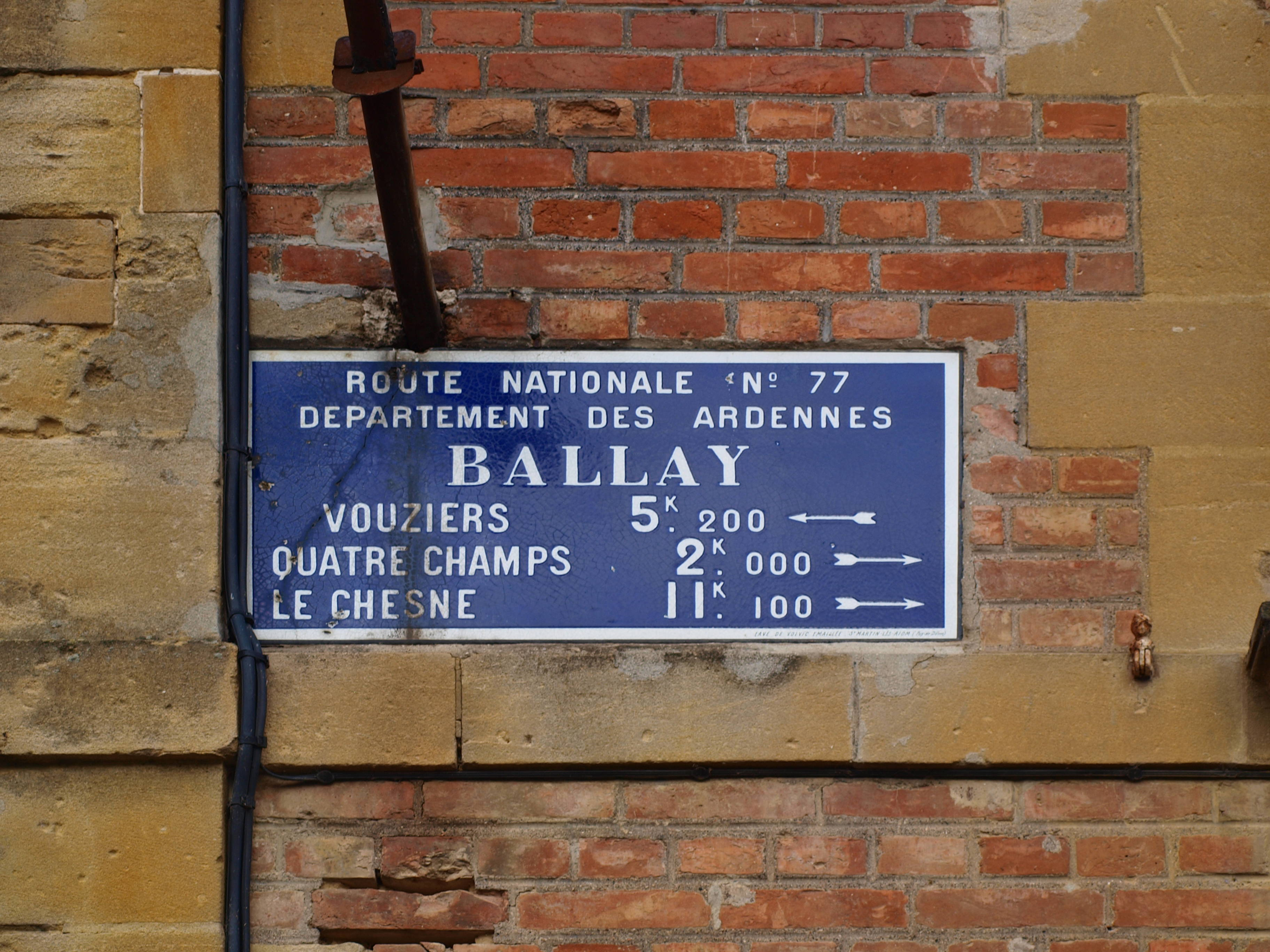 Ballay (Ardennes, France) ; ancien panonceau indicateur de la RN 77